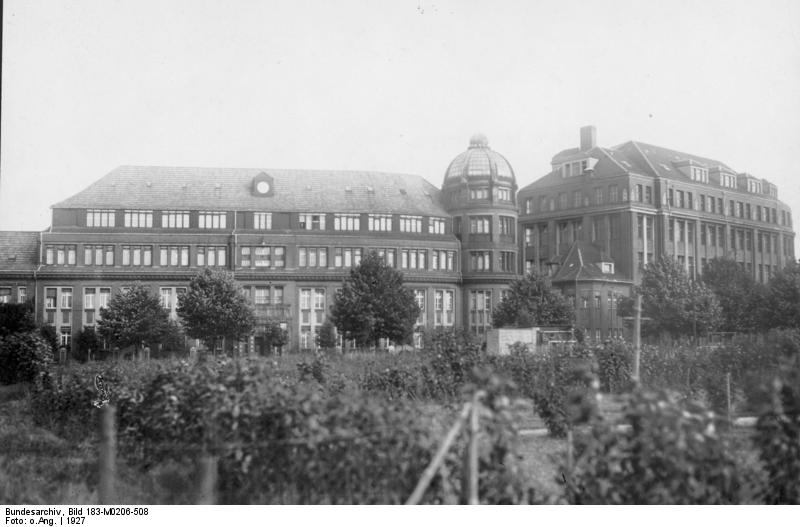 ADN-ZB-Archiv Berlin 1927 Riebenwerk (Niles-Werke) in Berlin-Weißensee [Scherl Bilderdienst]